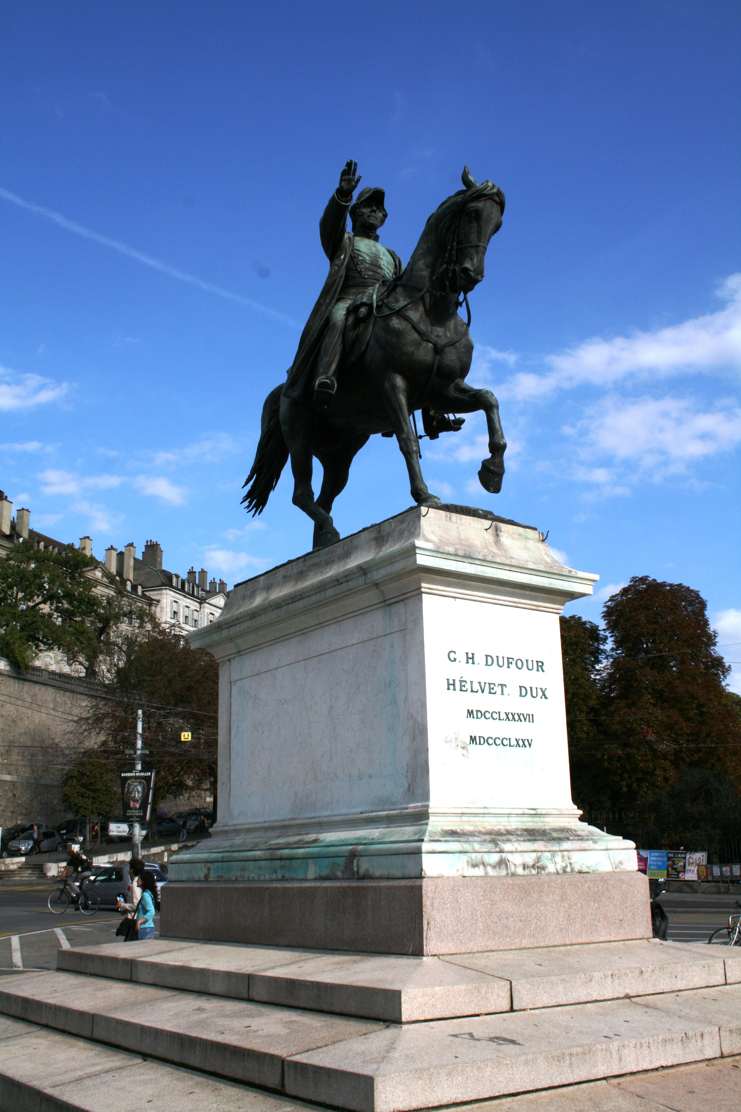 Statue équestre du général Dufour, au centre de la place Neuve à Genève.